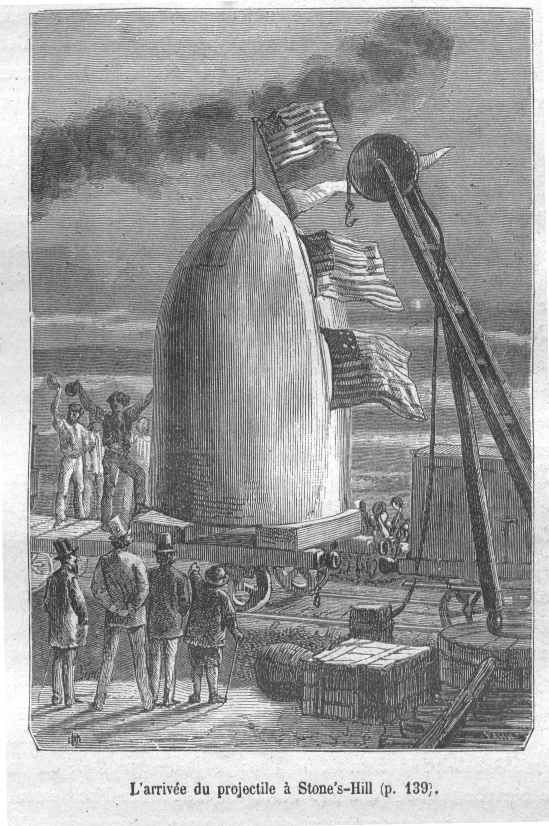 L'arrrivée du projectile à Stone-Hill (p. 139). De la Terre à la Lune, Jules Verne.